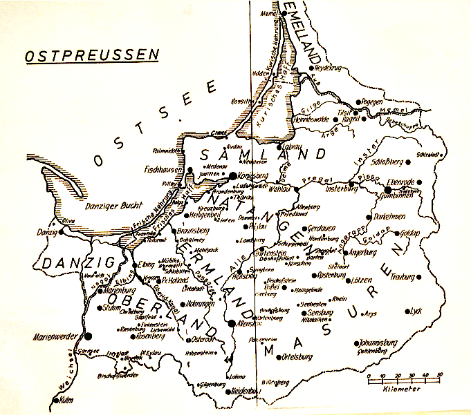 Ostpreussen karte, Mapa Prusy Wschodnie, East Prussia map